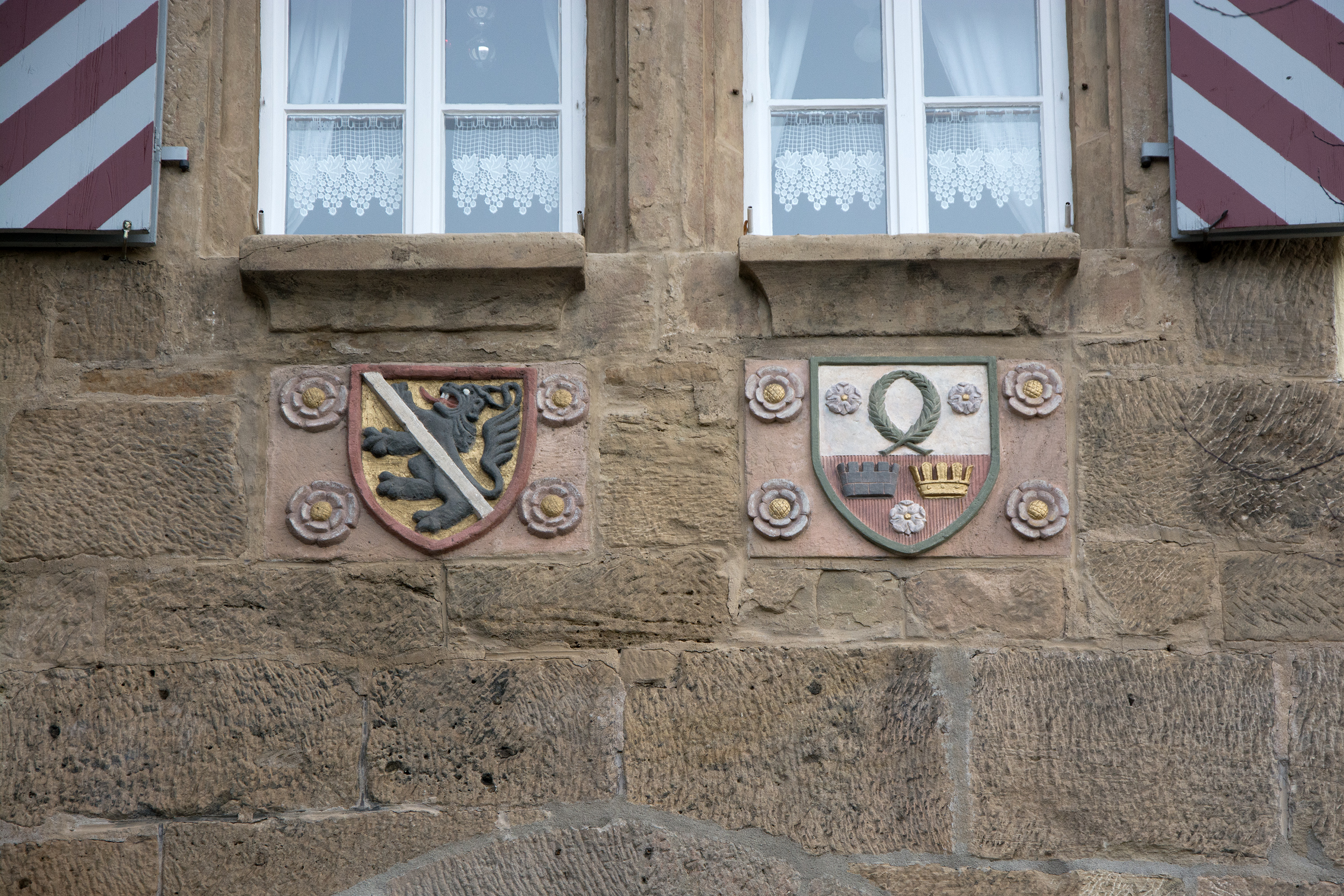 Wappen des Hochstifts Bamberg und Kronachs an der Stadtmauer über dem Bamberger Tor in Kronach